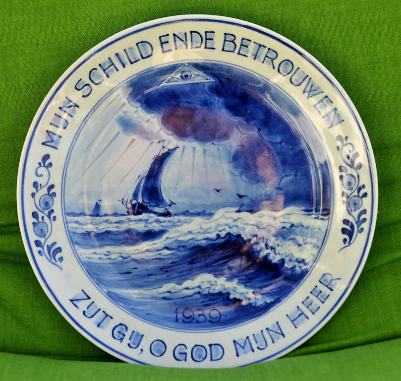 'Mijn Schild Ende Betrouwen Zijt Gij, O God Mijn Heer'. Plate in honour of the Dutch national anthem (Wilhelmus).